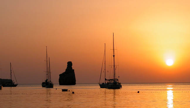 puesta de sol en Ibiza. Sunset in Ibiza